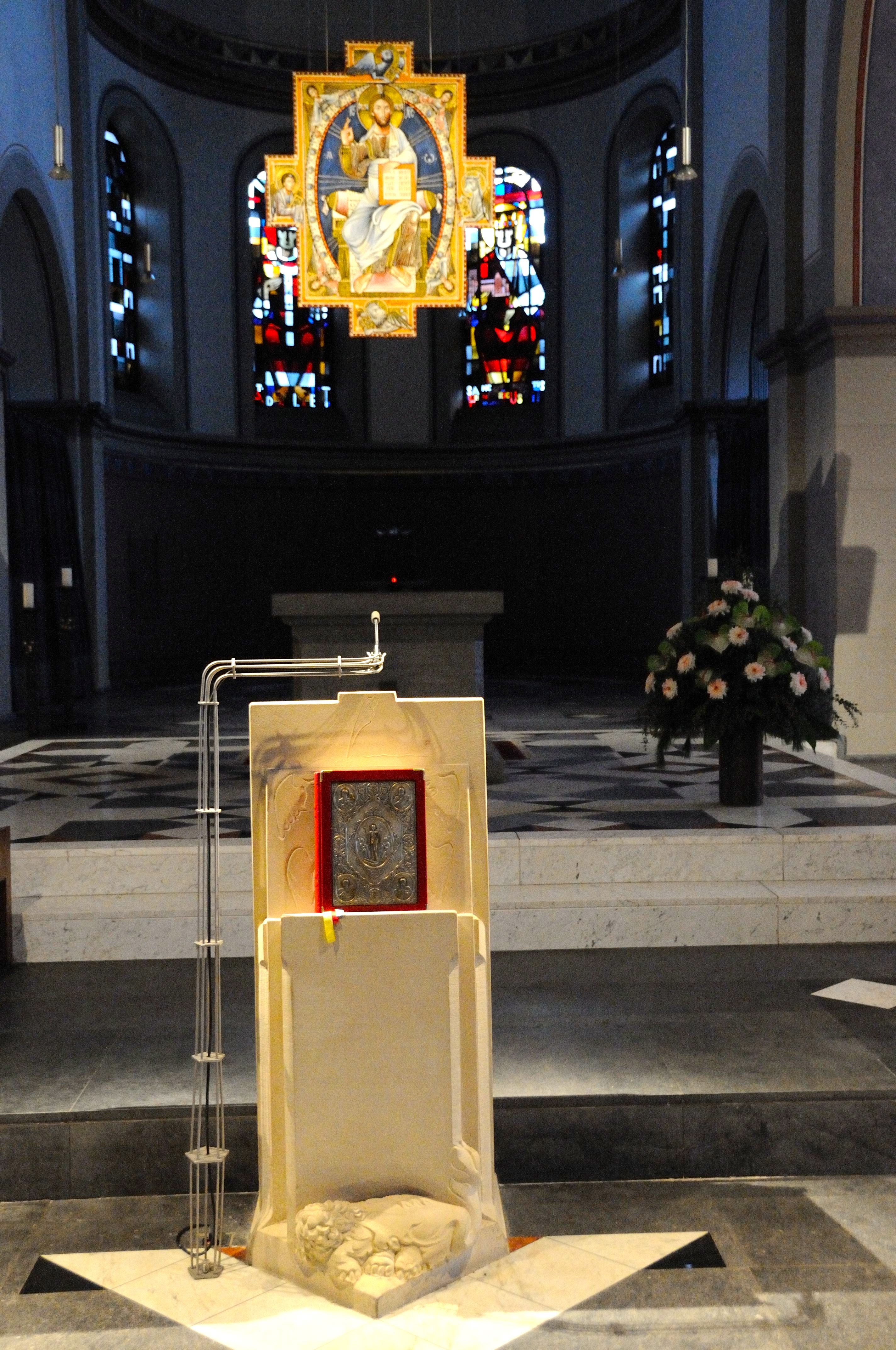 Ambo von Titus Reinarz für St. Adalbert, Aachen